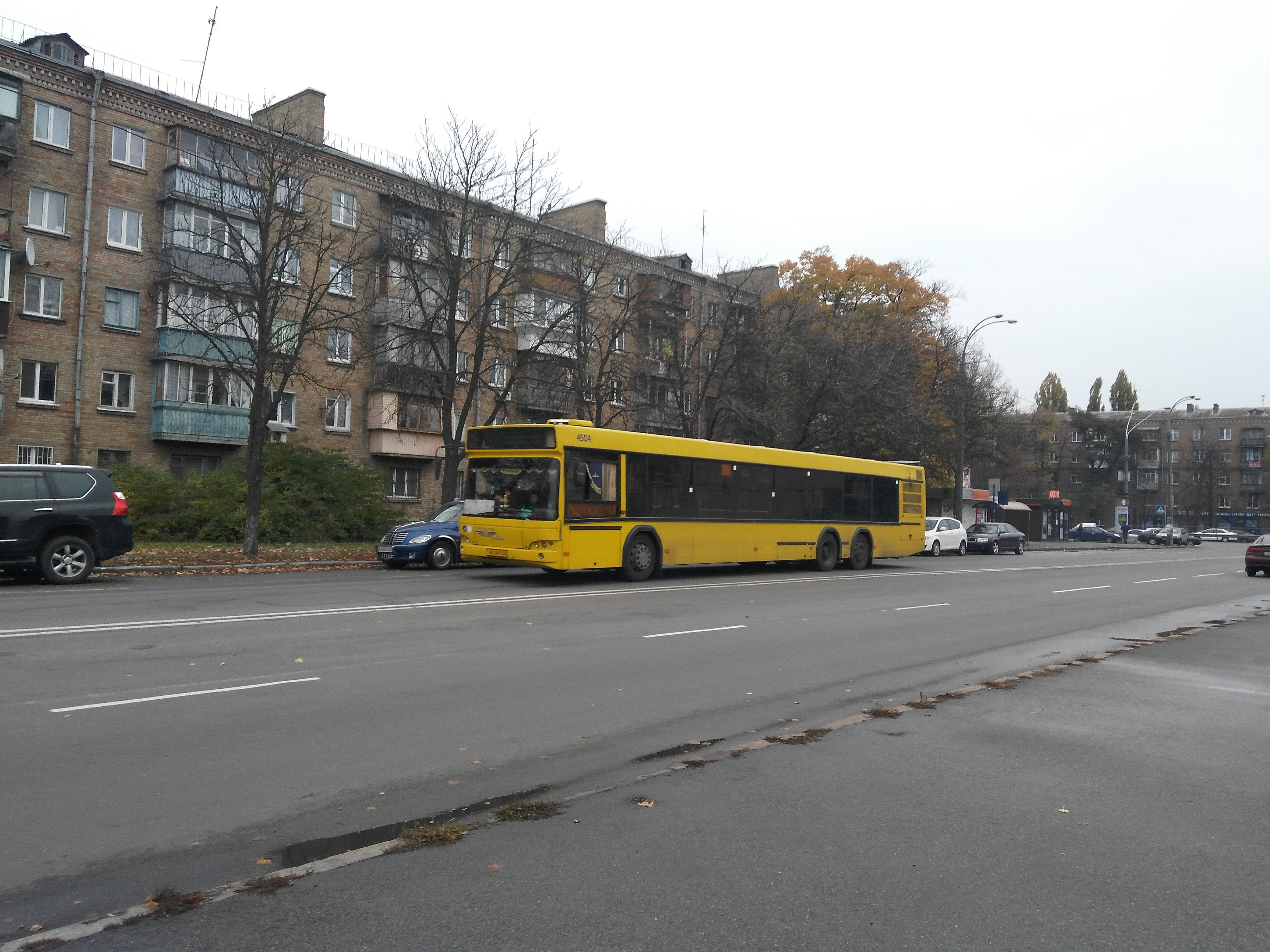 Фотографія автобуса МАЗ-107 на вул. Туполєва у Києві